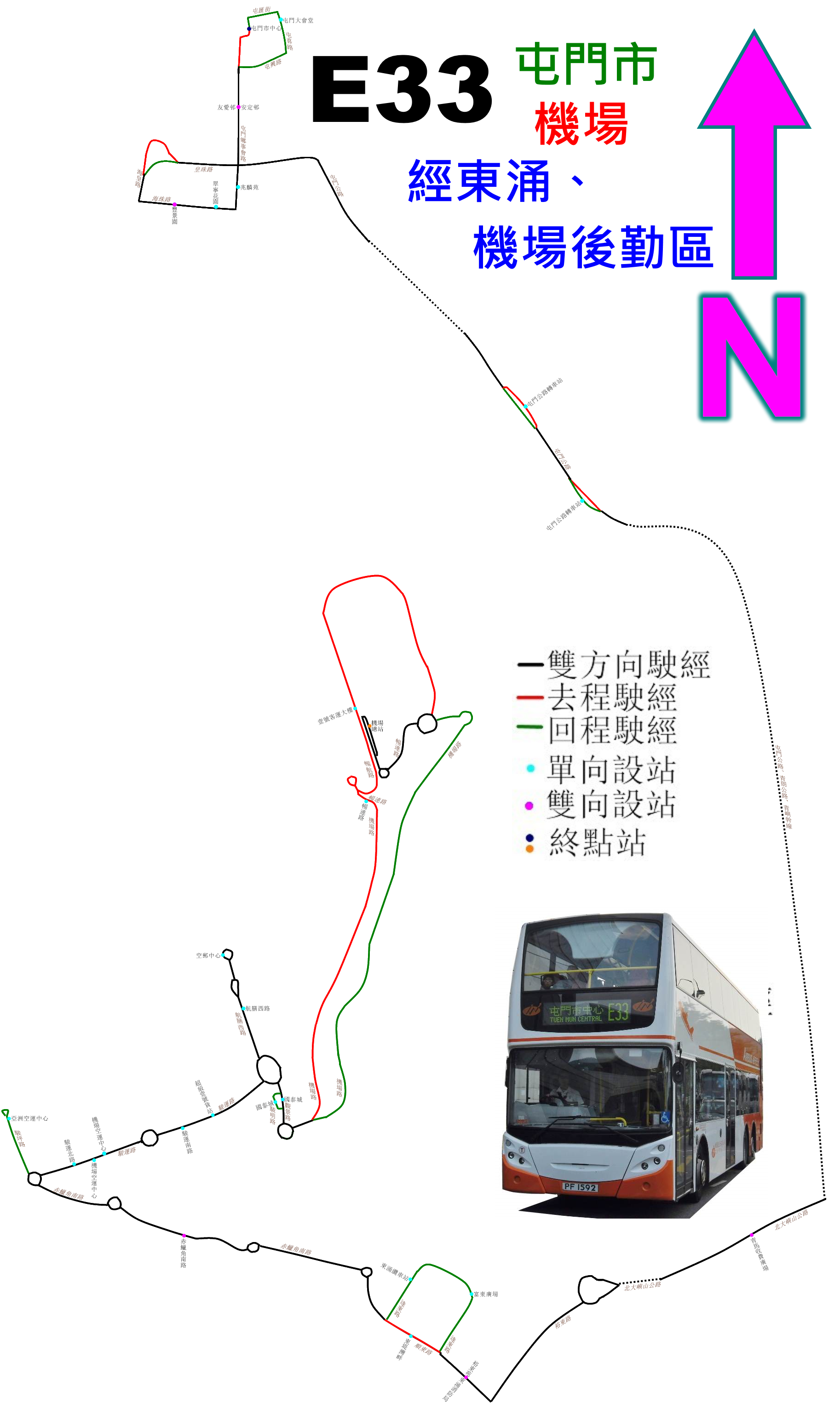 中文（香港）: 龍運巴士E33線的走線圖